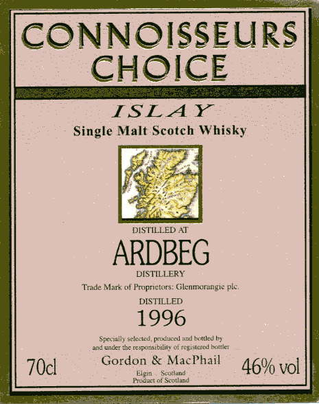 Etiquette d'une bouteille d'Ardbeg distribuée par le négociant Gordon & McPhail